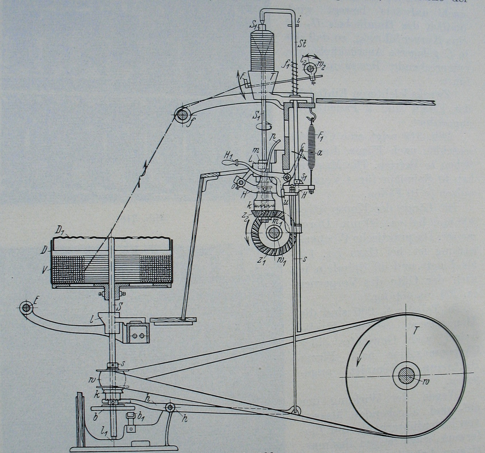 Schema: Dosenspinnmaschine